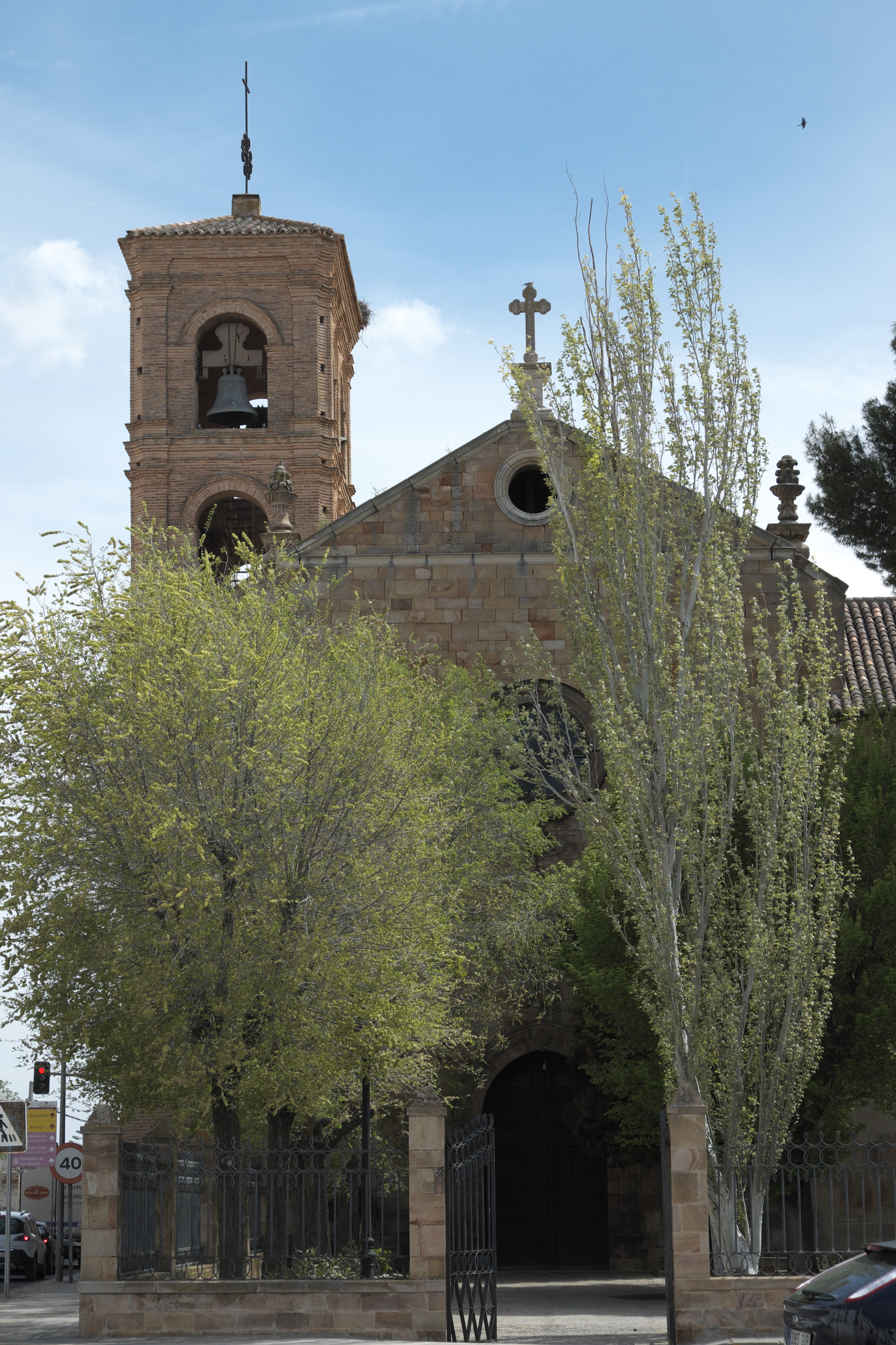 Ehemaliges Frauenkloster des Calatrava-Ordens, Convento de la Asunción (Mariä Himmelfahrt), in Almagro in der Provinz Ciudad Real (Kastilien-La Mancha/Spanien), Kirche